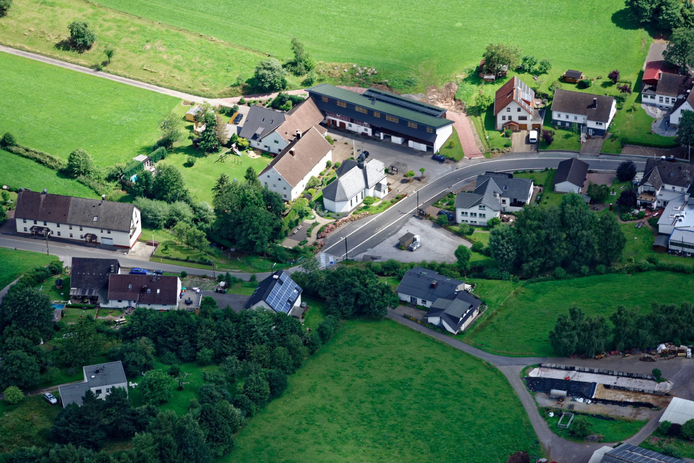 Fotoflug Sauerland West. Luftaufnahme: Östlicher Teil von Blintrop, Blick Richtung Südosten, Nordrhein-Westfalen.